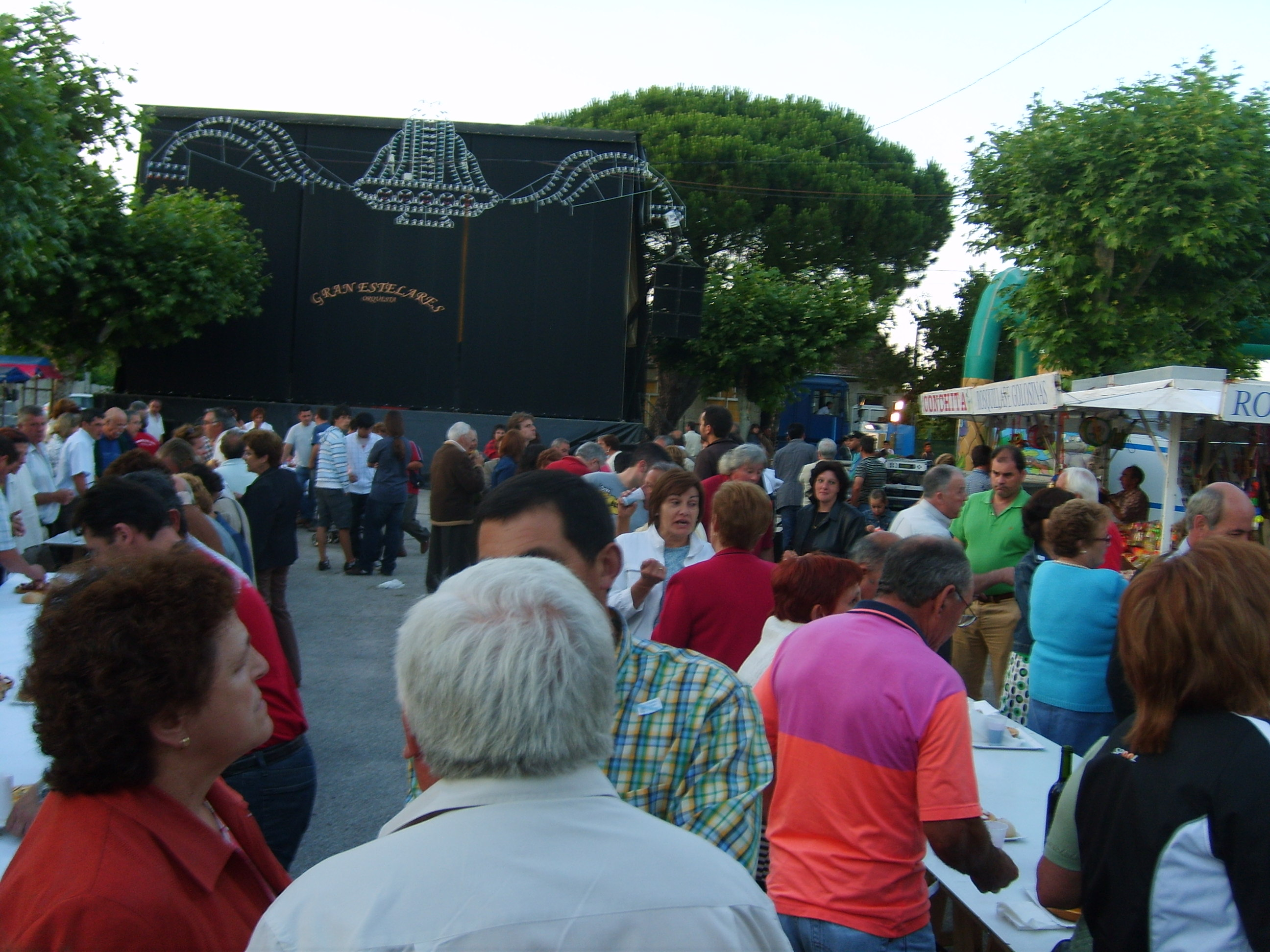 Grandes festas en Baldráns, Tui